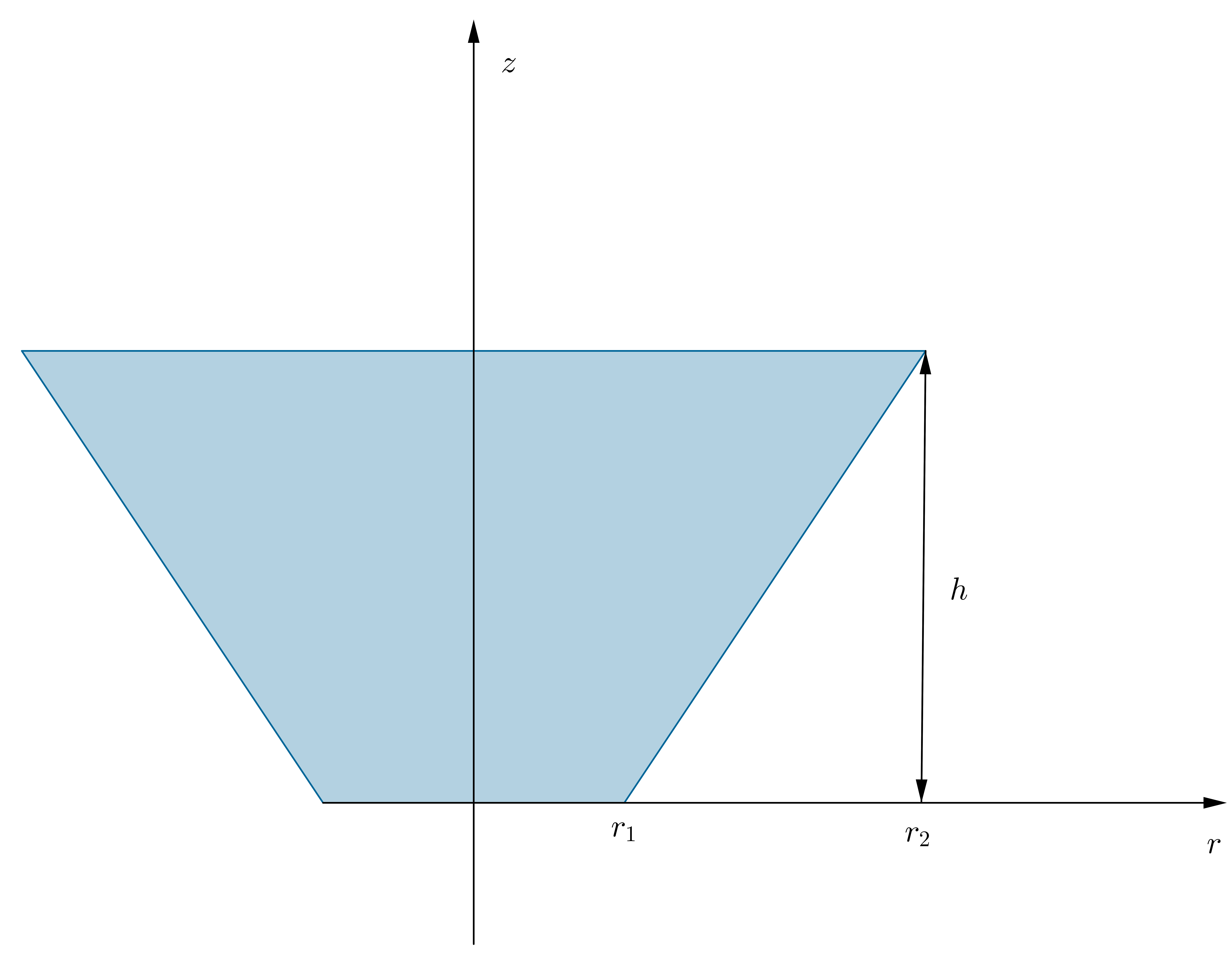 Kegelsegment